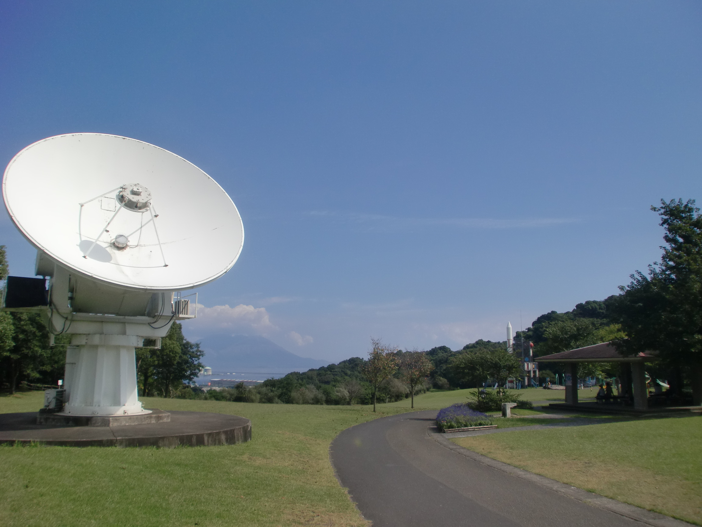 錦江湾公園の園内の風景。